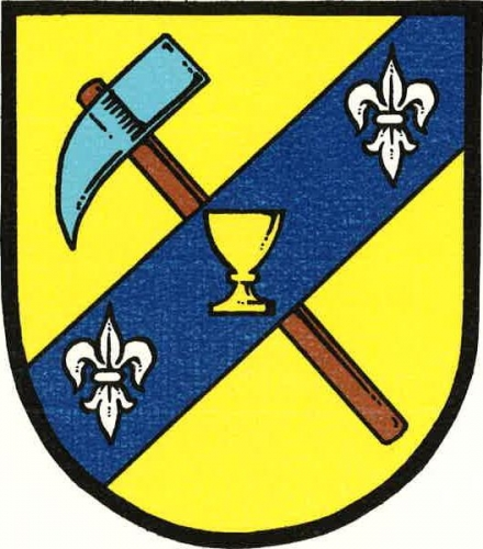 znak, Nové Dvory, okres Příbram